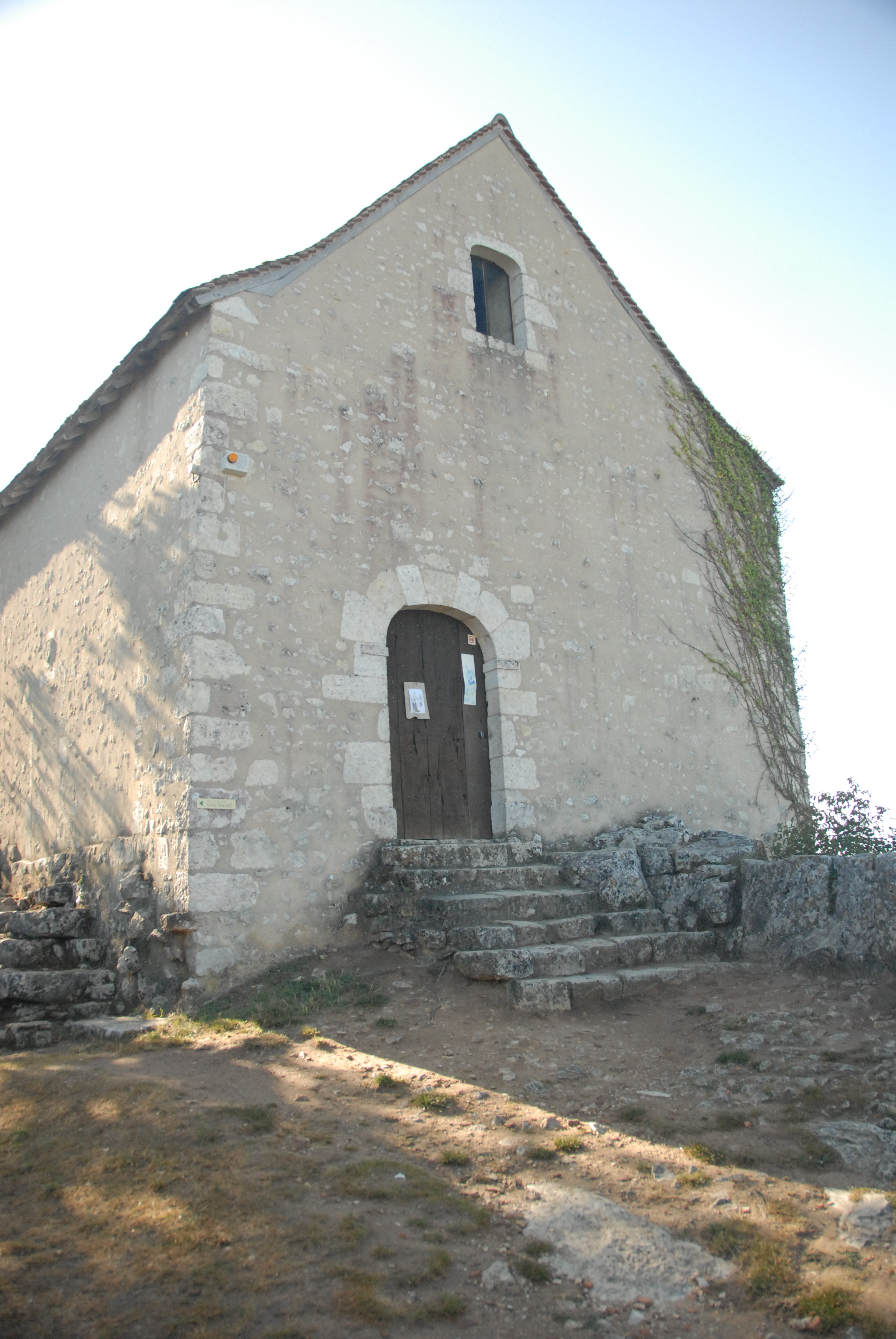 Angles-sur-l'Anglin, Kapelle St-Pierre